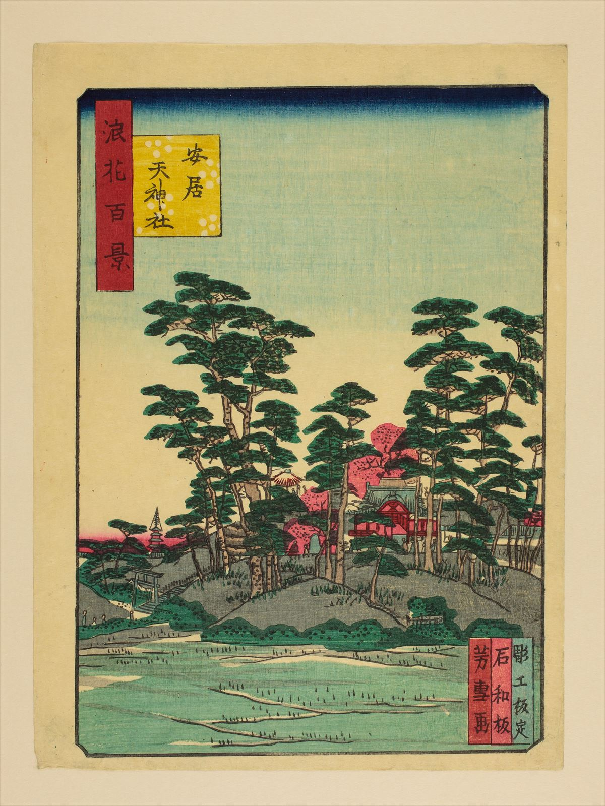 1800年代。南粋亭芳雪/画 。浪花百景 102枚のうちの1枚。大阪市立中央図書館蔵。